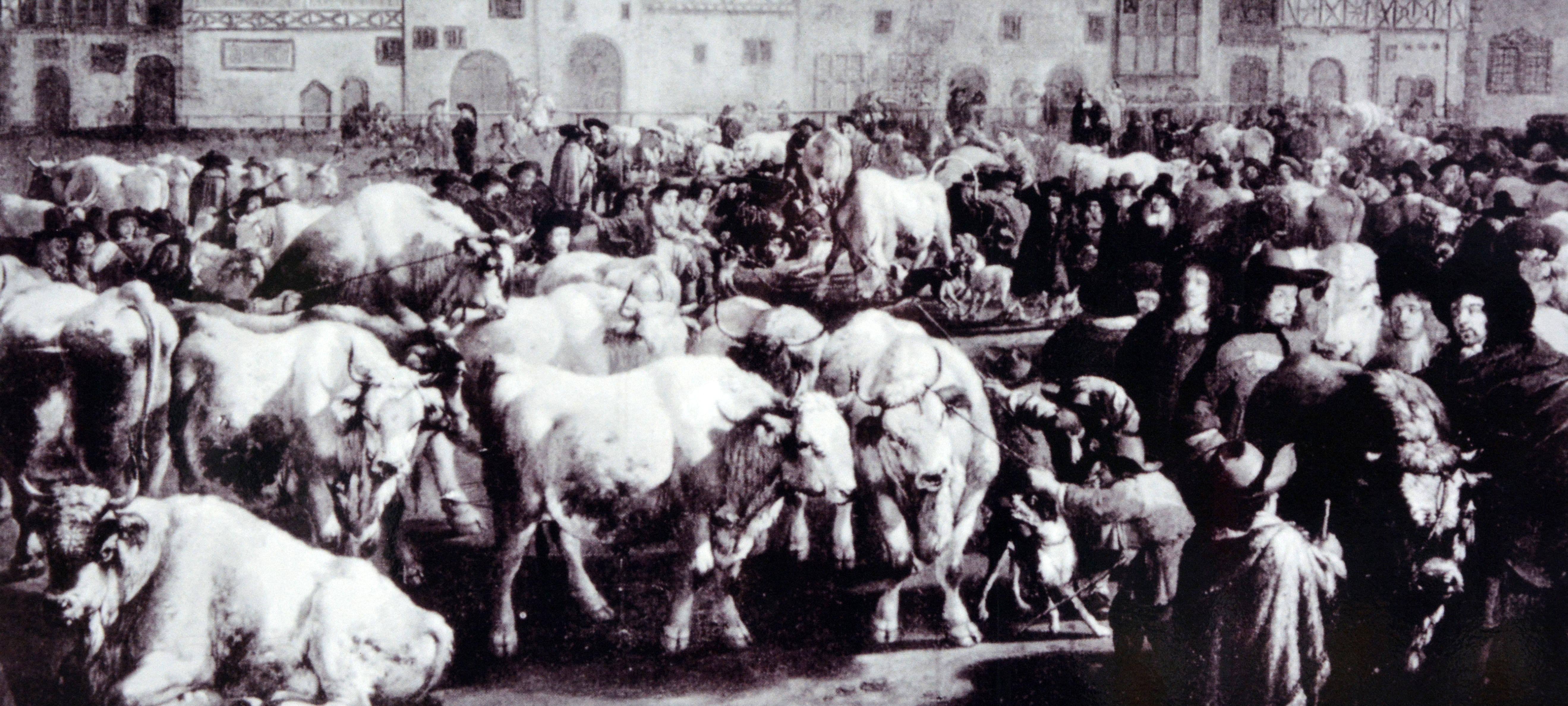 Historische Darstellung des Ochsenmarkts um 1750.